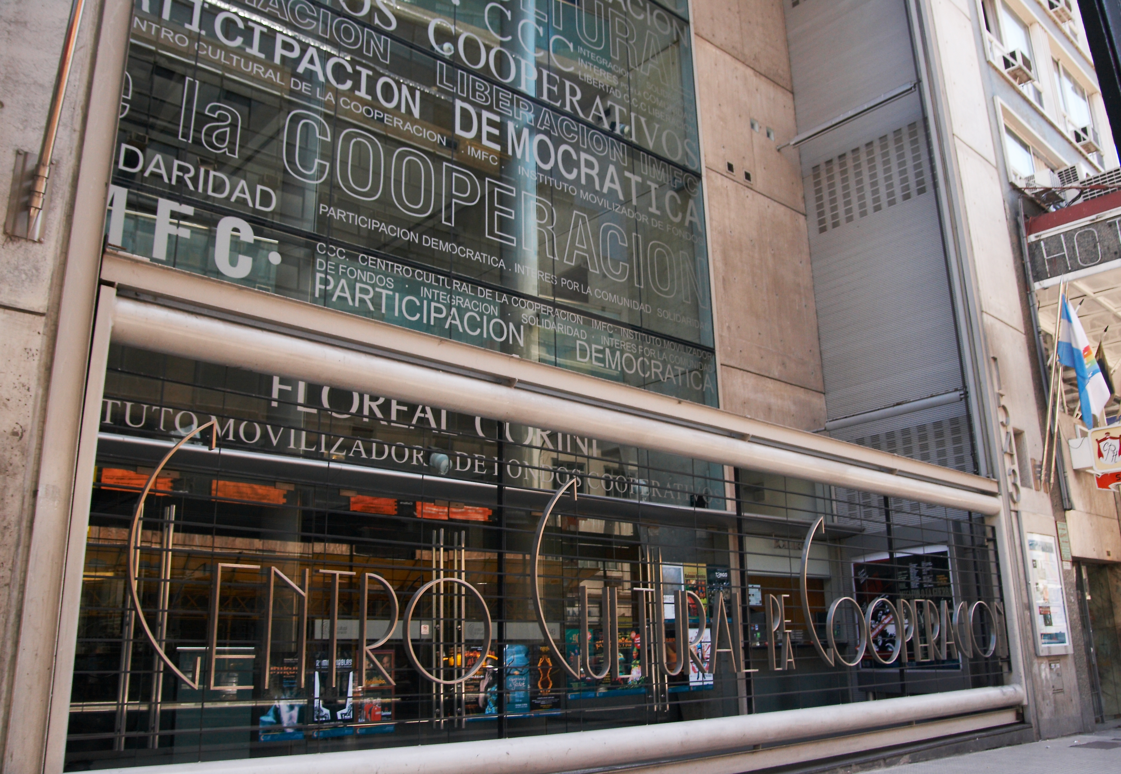 Centro Cultural de la Cooperación Floreal Gorini, Corrientes 1543, barrio de San Nicolás, Buenos Aires, Argentina.